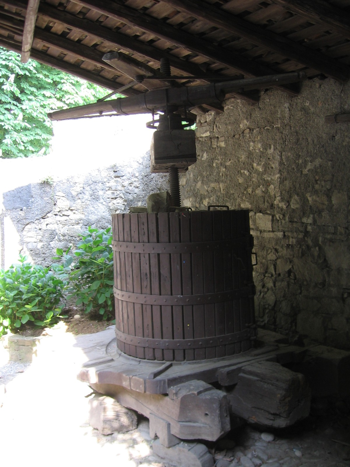 Grumello del monte, Bergamo, Italia